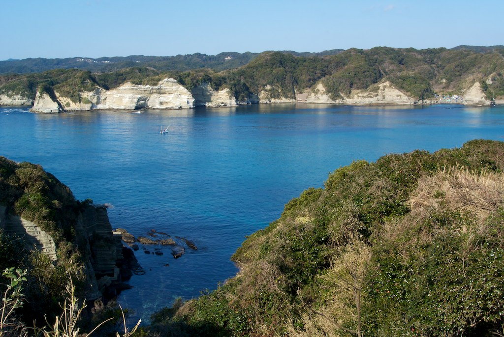 CC-BY-2.0 で Flickrにアップロードされていた画像。 鵜原理想郷ハイキングコース